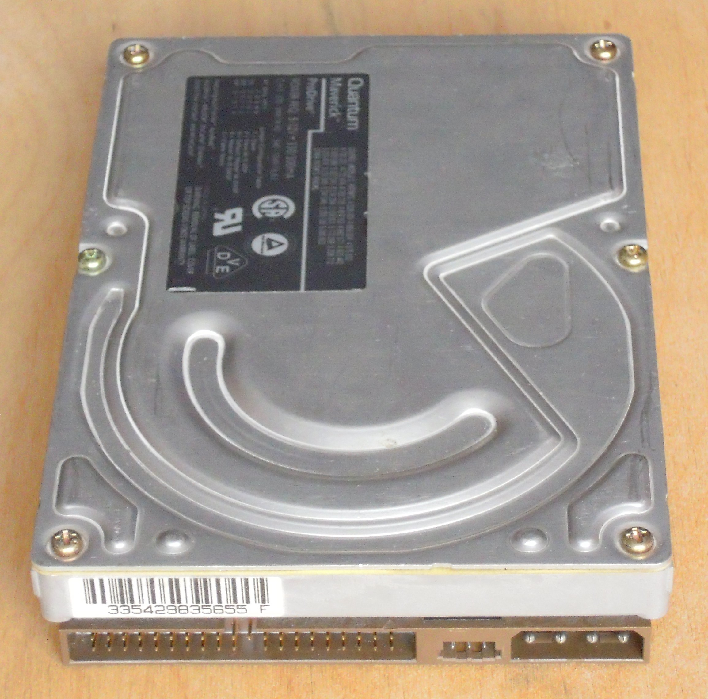 Diskaparato «Quantum Maverick ProDrive» por ATA, kredeble je 540 MB. Apud la strekokodo estas surskribo «540AT P/N MV54A011 Rev 02-G».